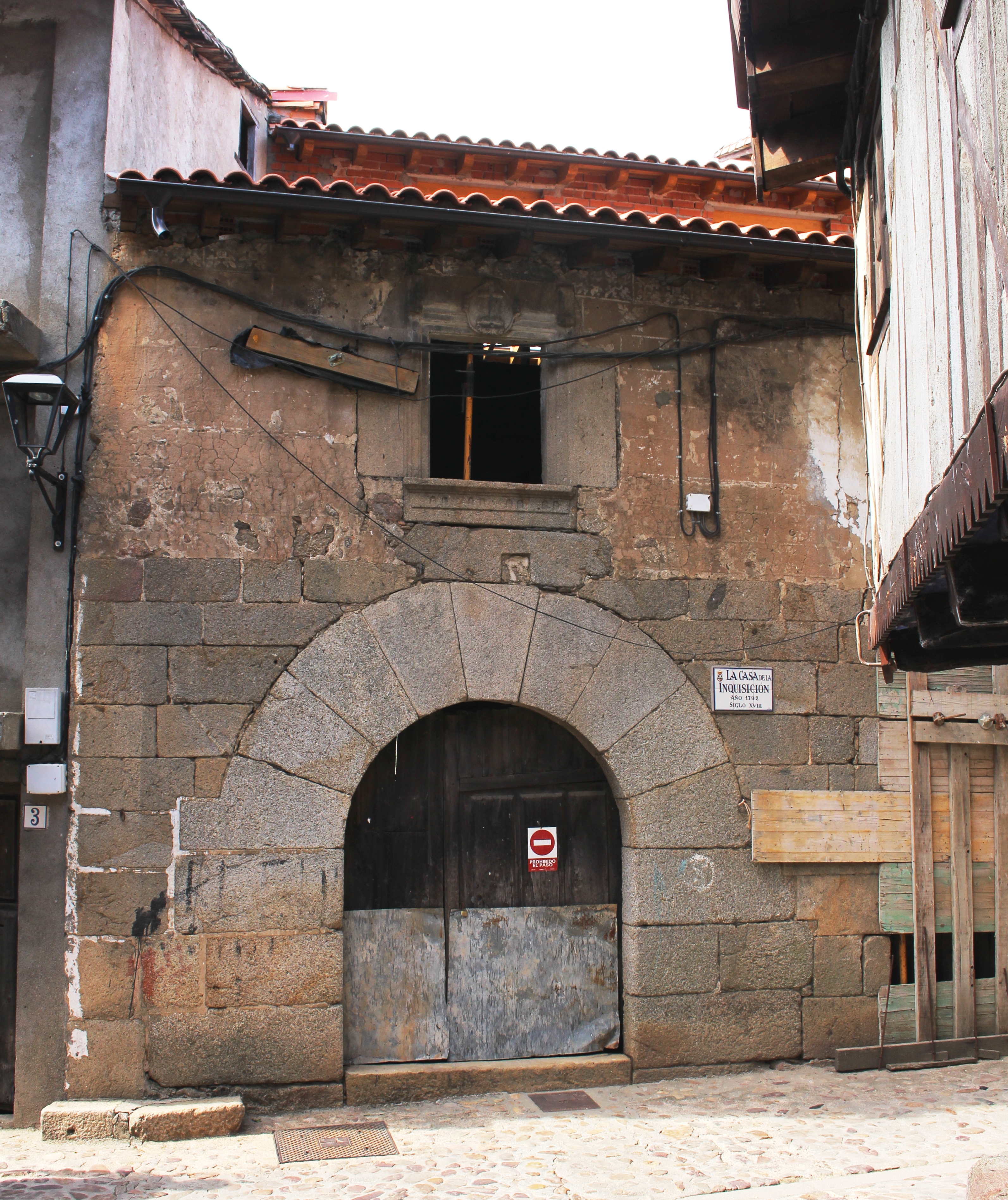 Maison de l'Inquisition de Cepeda, Salamanca